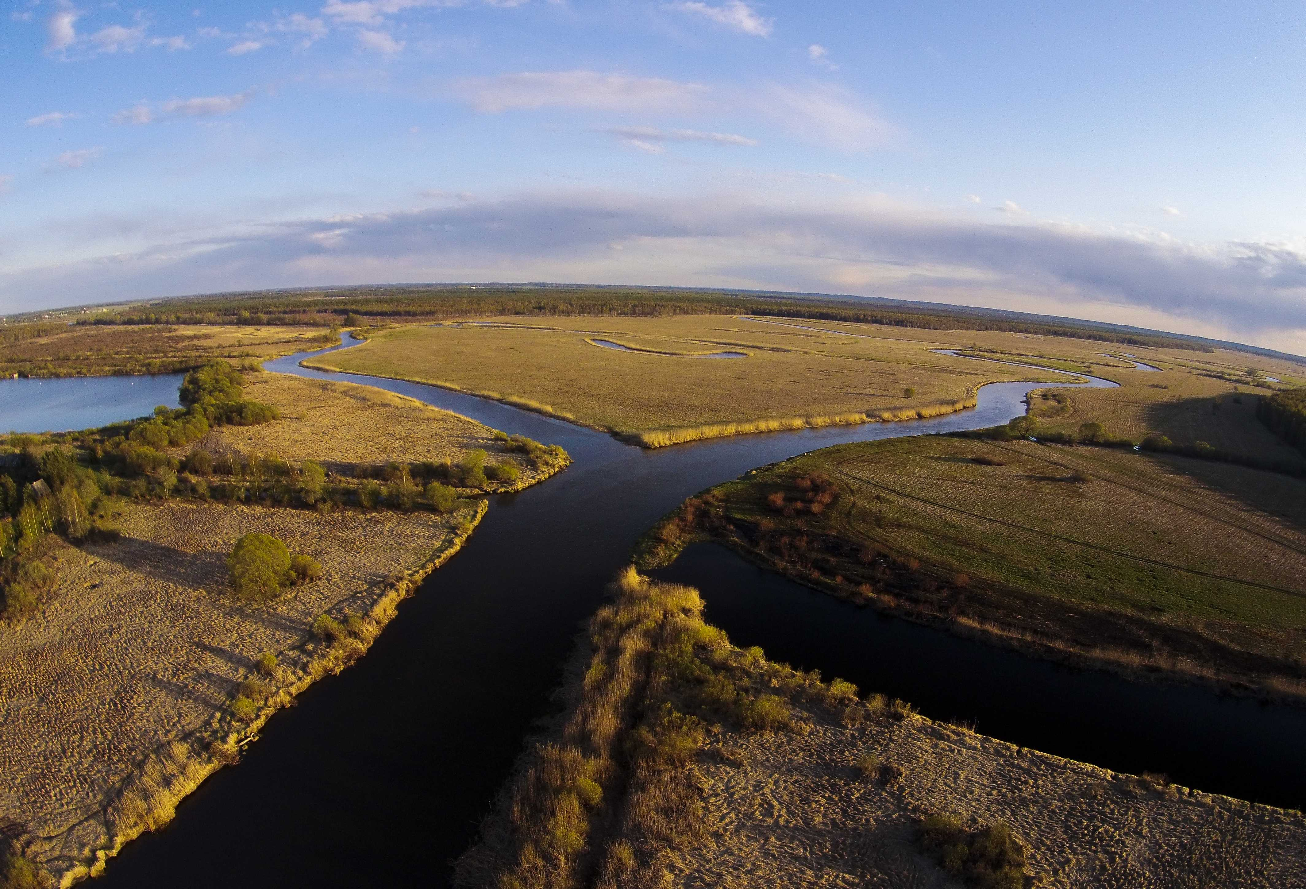 Emajõgi, pildil vasakult suubub Ilmatsalu jõgi. Alam-Pedja looduskaitseala